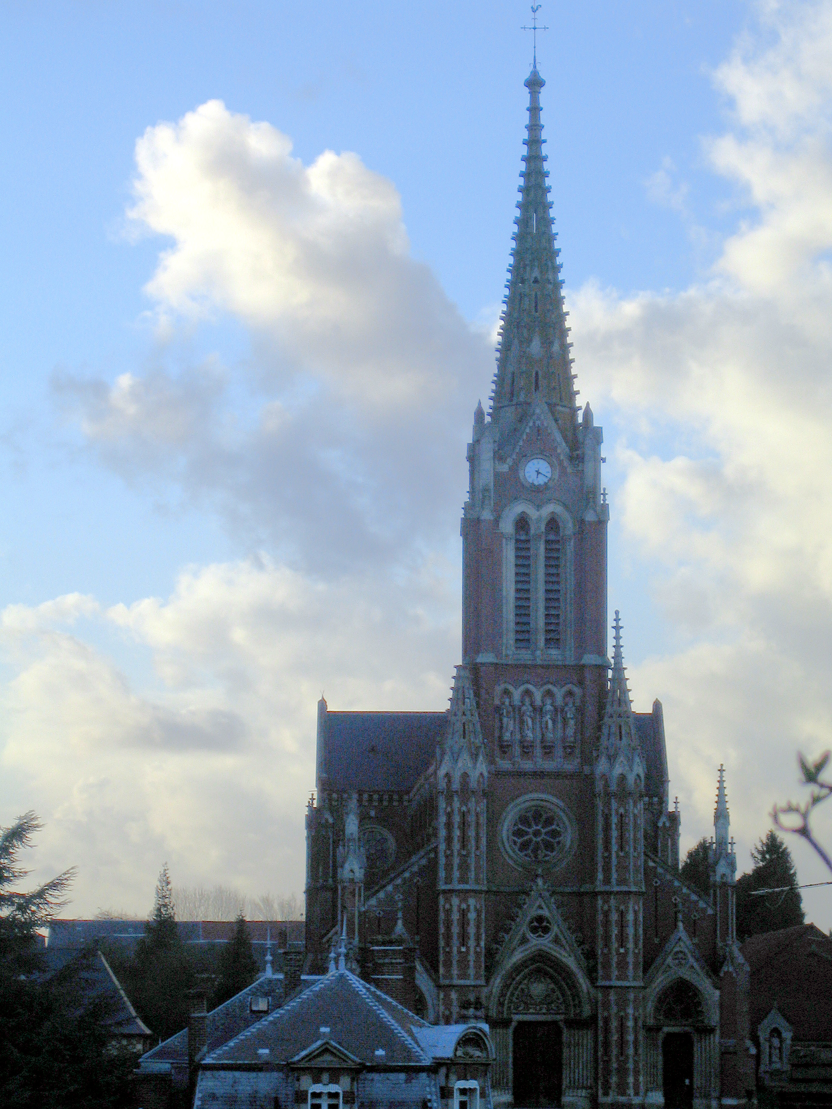 Beauval (Somme, France) - L'église vue depuis la Route Nationale 25, à droite (en direction d'Amiens, et en provenance de Doullens).